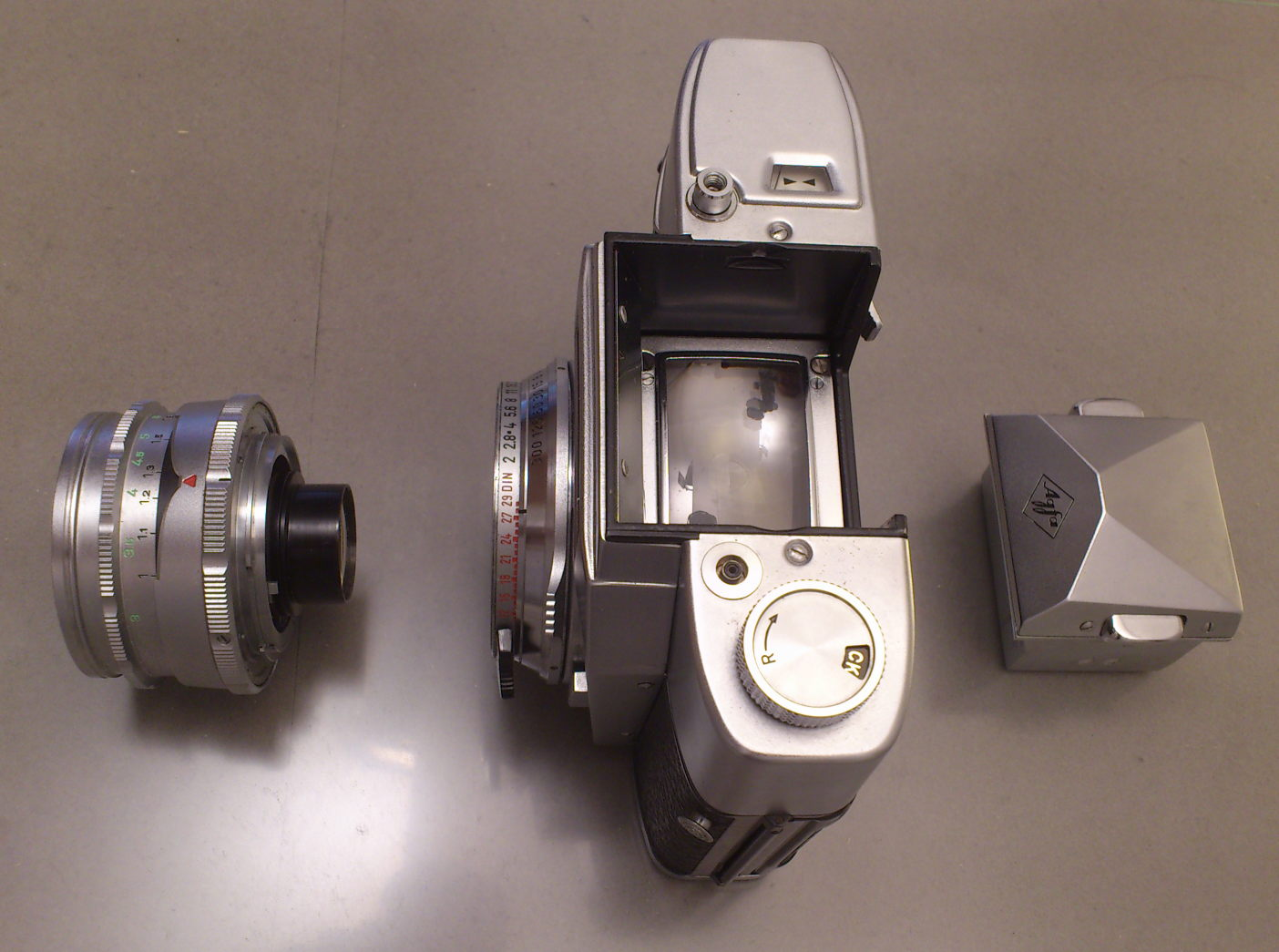 Abnehmbare Elemente: Agfa Ambiflex 1959 Camera-Werk-Muenchen